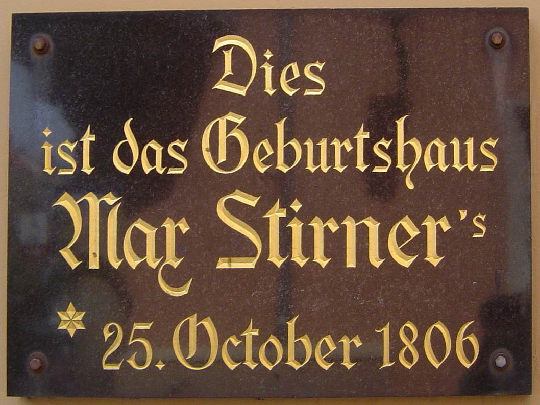 Bayreuth, Gedenktafel am Nachfolgebau von Max Stirners 1970 abgerissenem Geburtshaus, Maximilianstrasse 31